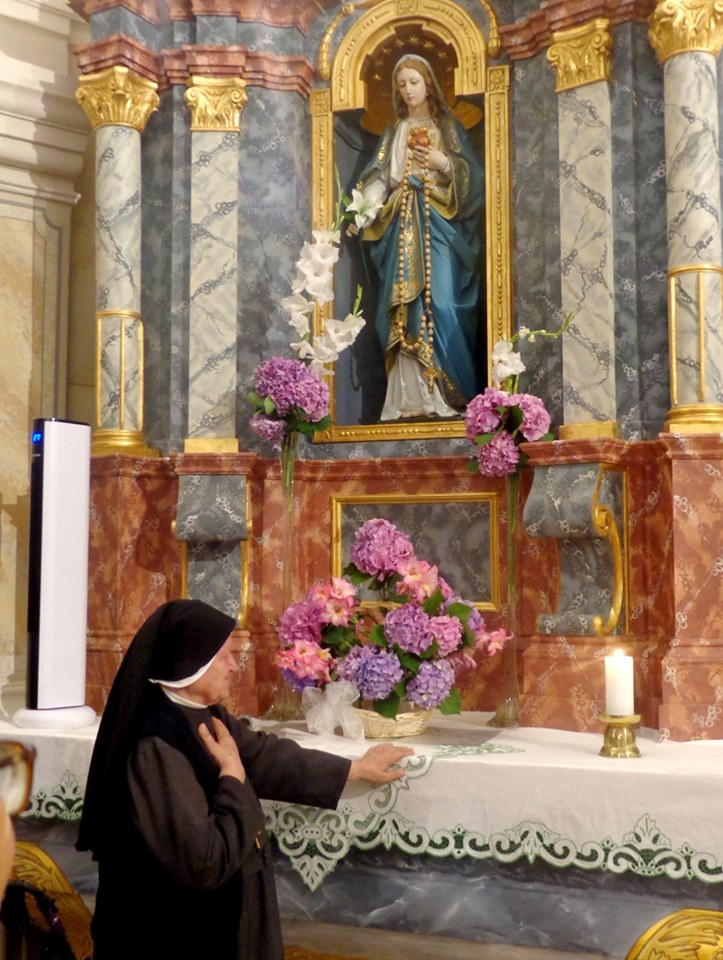 Vidjelica č.s. Bernardica Golubičić uz oltar i kip BDM u župnoj crkvi Sv. Martina u Bošnjacima